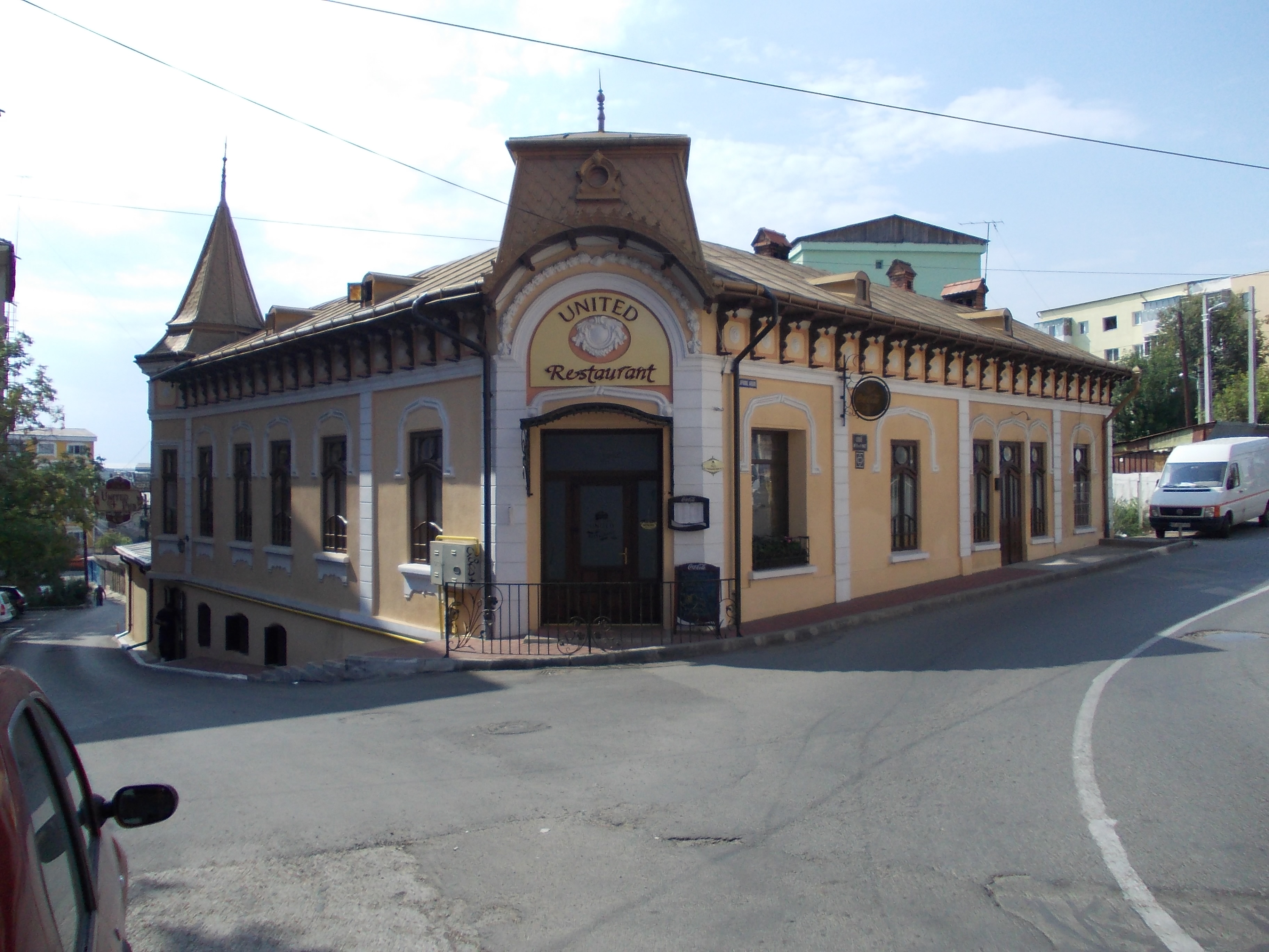 Casă în Roman, Neamţ